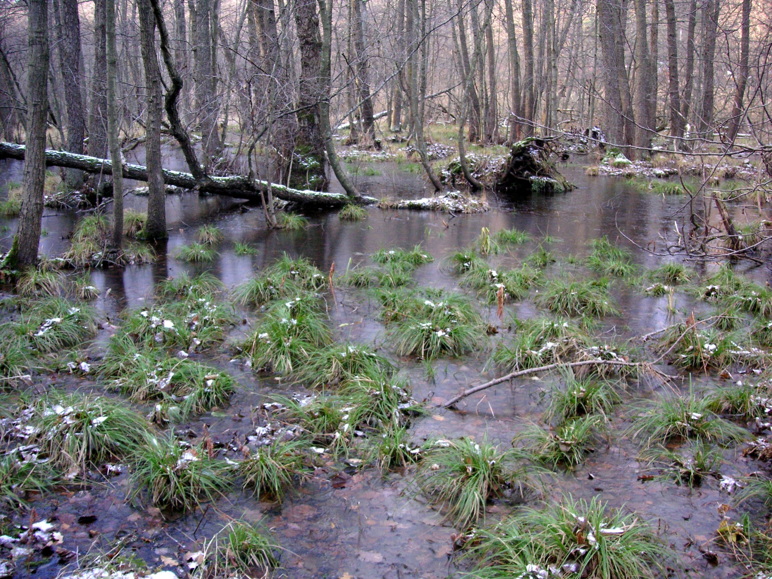 Uggleviken i Norra Djurgården, Stockholm